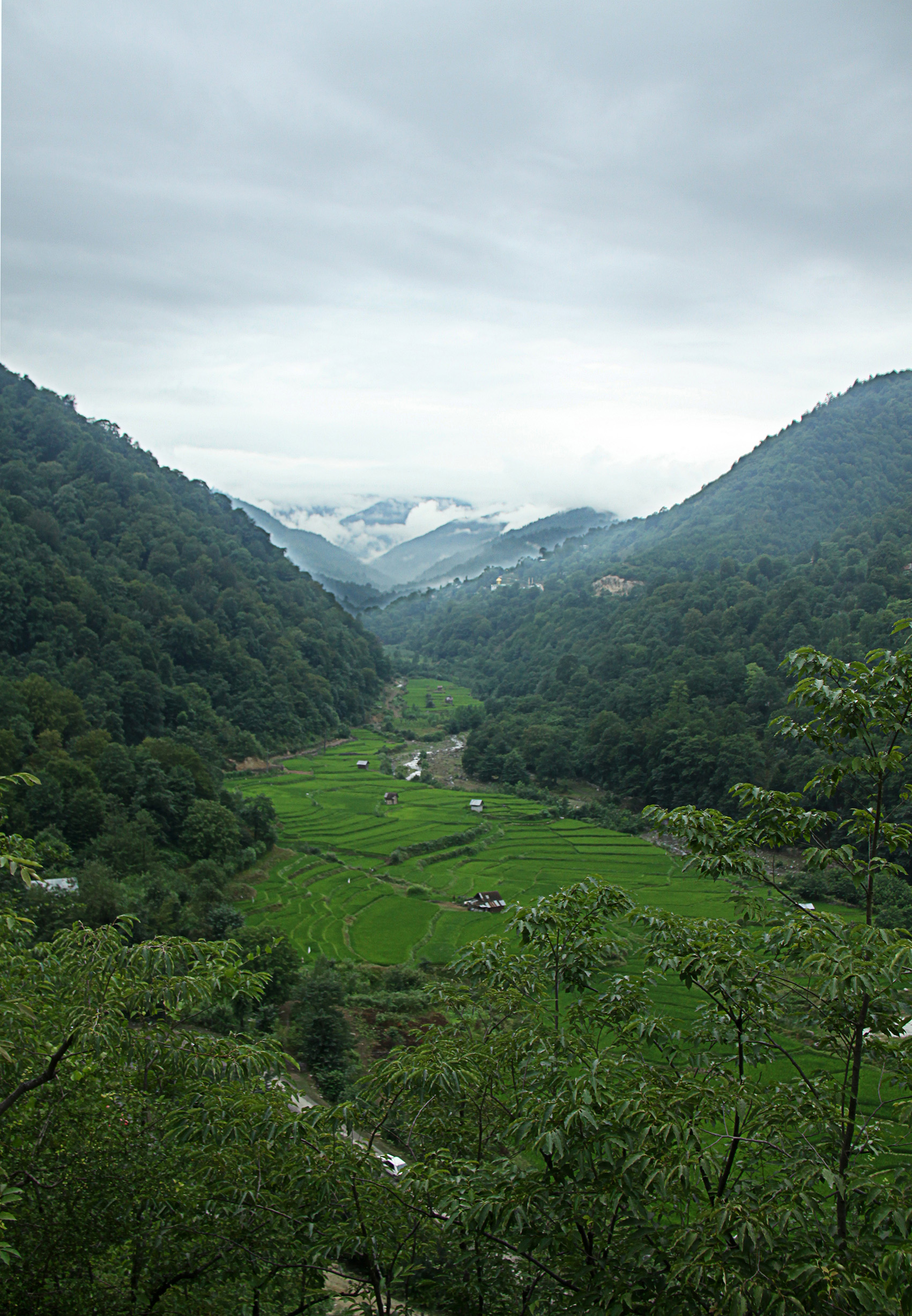 بند پی